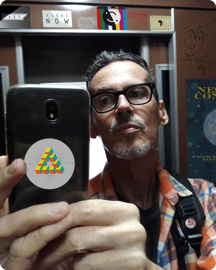 Selbstportrait